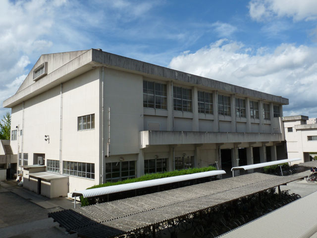 福岡県立春日高校 体育館